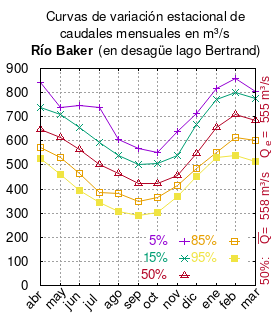 Curvas de variación estacional del río Baker en el desagüe del Lago Bertrand. # Universidad de Chile # Pronóstico de caudales medios mensuales en las cuencas de los río Baker y Pascua # Memoria de Pilar Andrea Barría Sandoval # 2010 # url= # Río Baker en el desague del Lago Bertrand. pág. 20 mes 5% 15% 50% 85% 95% abr 842 737 648 572 527 may 737 709 614 531 459 jun 745 657 564 463 394 jul 738 592 503 386 344 ago 607 540 466 381 307 sep 567 501 424 350 292 oct 552 506 422 365 304 nov 639 538 458 414 370 dic 712 668 546 484 454 ene 816 772 656 552 532 feb 857 802 708 612 539 mar 803 776 685 602 515